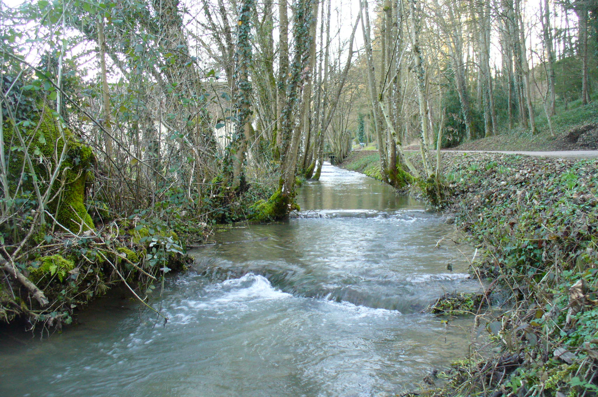 ru d'escamps près du chateau